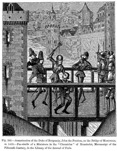 Assassinat de Jean Ier de Bourgogne en 1419